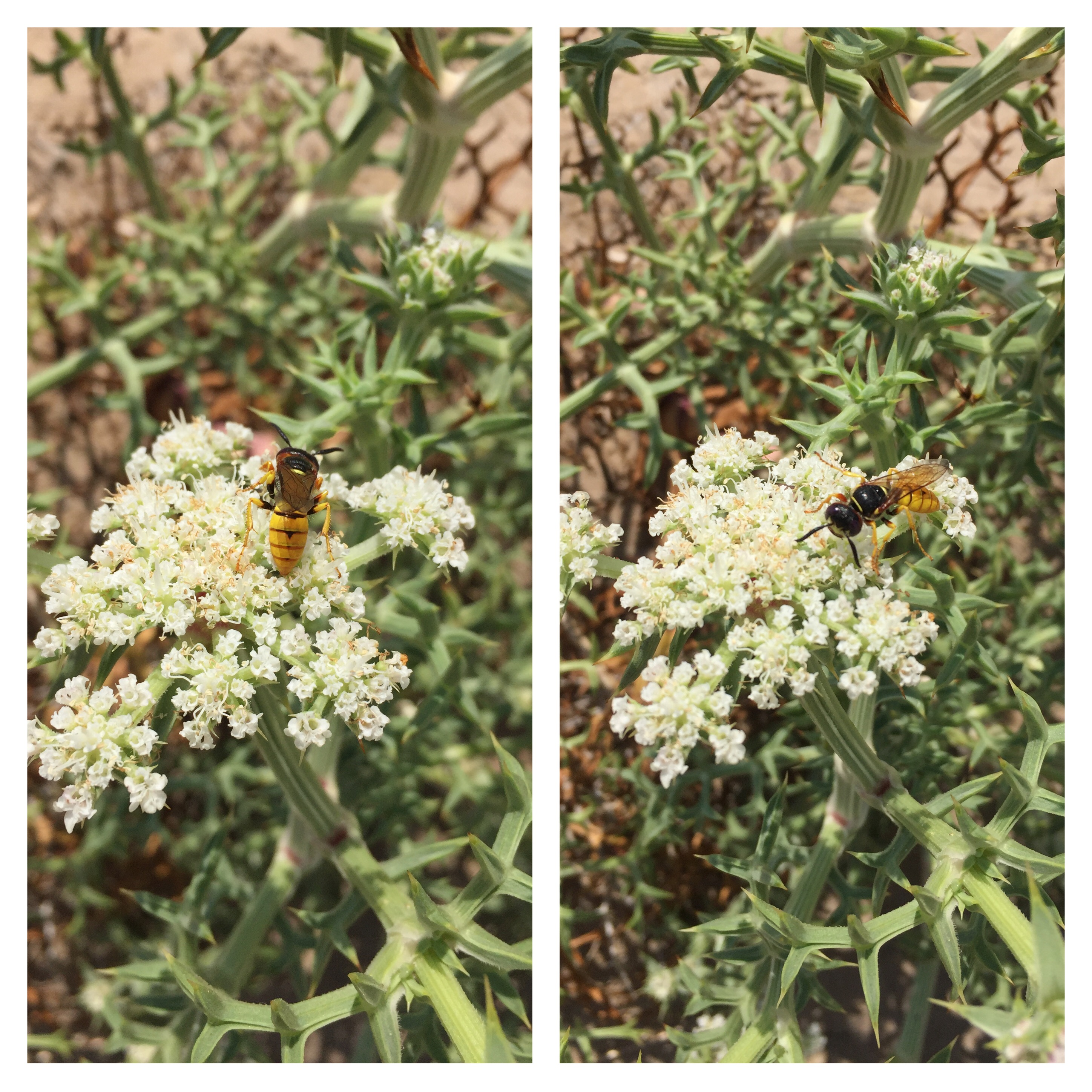 Bees